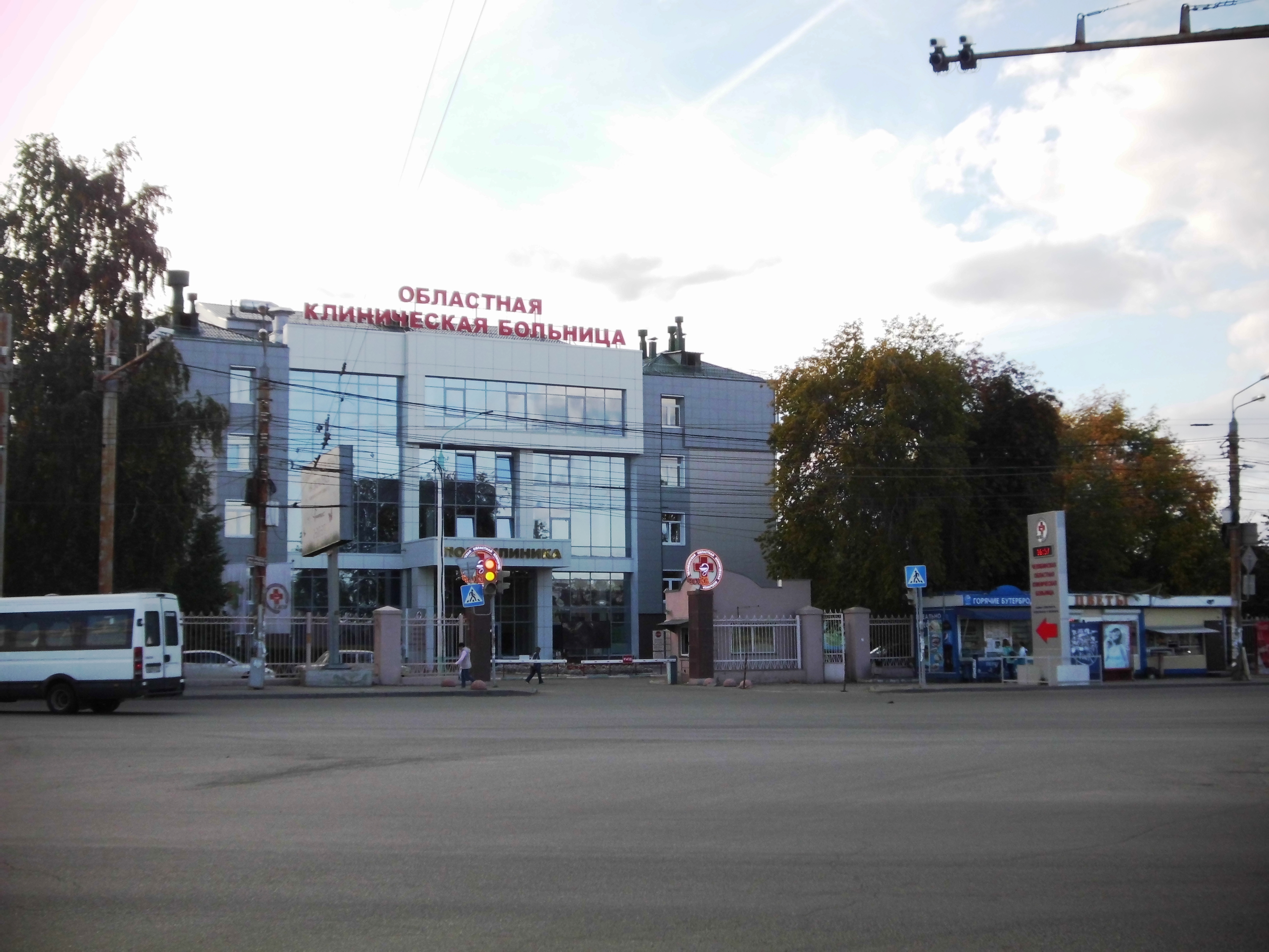 Челябинская областная клиническая больница № 1. Город Челябинск, ул. Воровского, 70. Главные ворота и поликлиника (Воровского, 70, корпус 1). Вид со стороны перекрёстка ул. Воровского, Блюхера, Салтыкова.